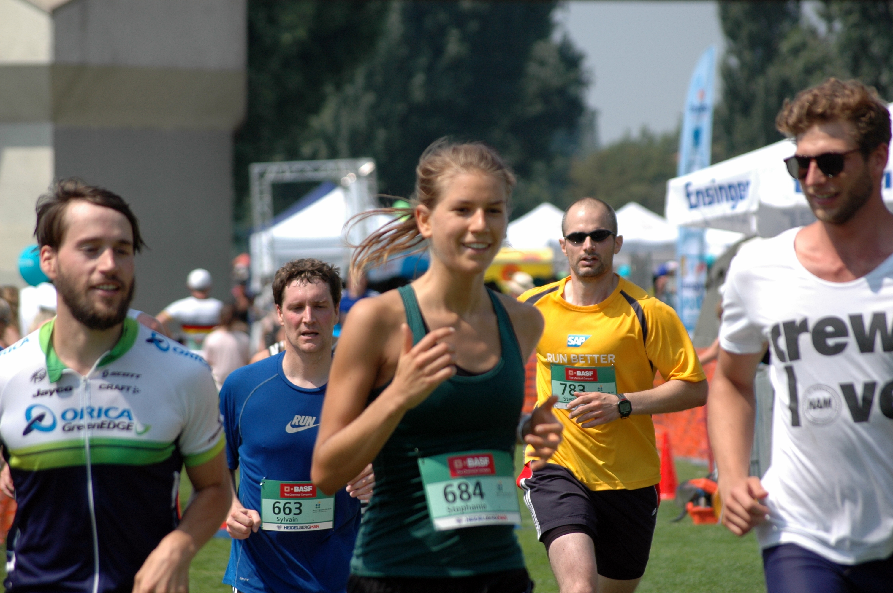 HeidelbergMan 2014